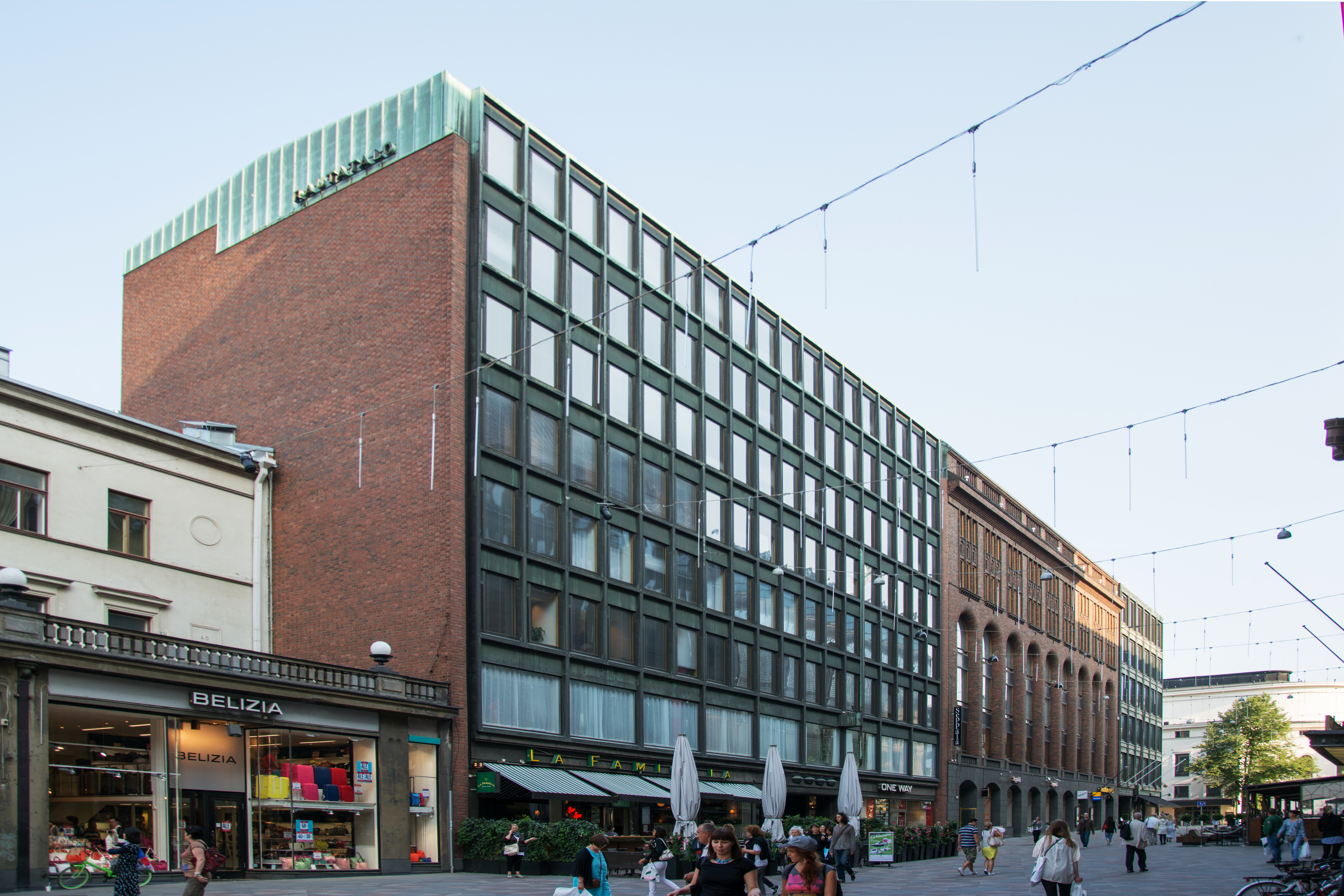 Alvar Aallon suunnittelema, vuonna 1955 valmistunut Rautatalo Keskuskadulla Helsingissä